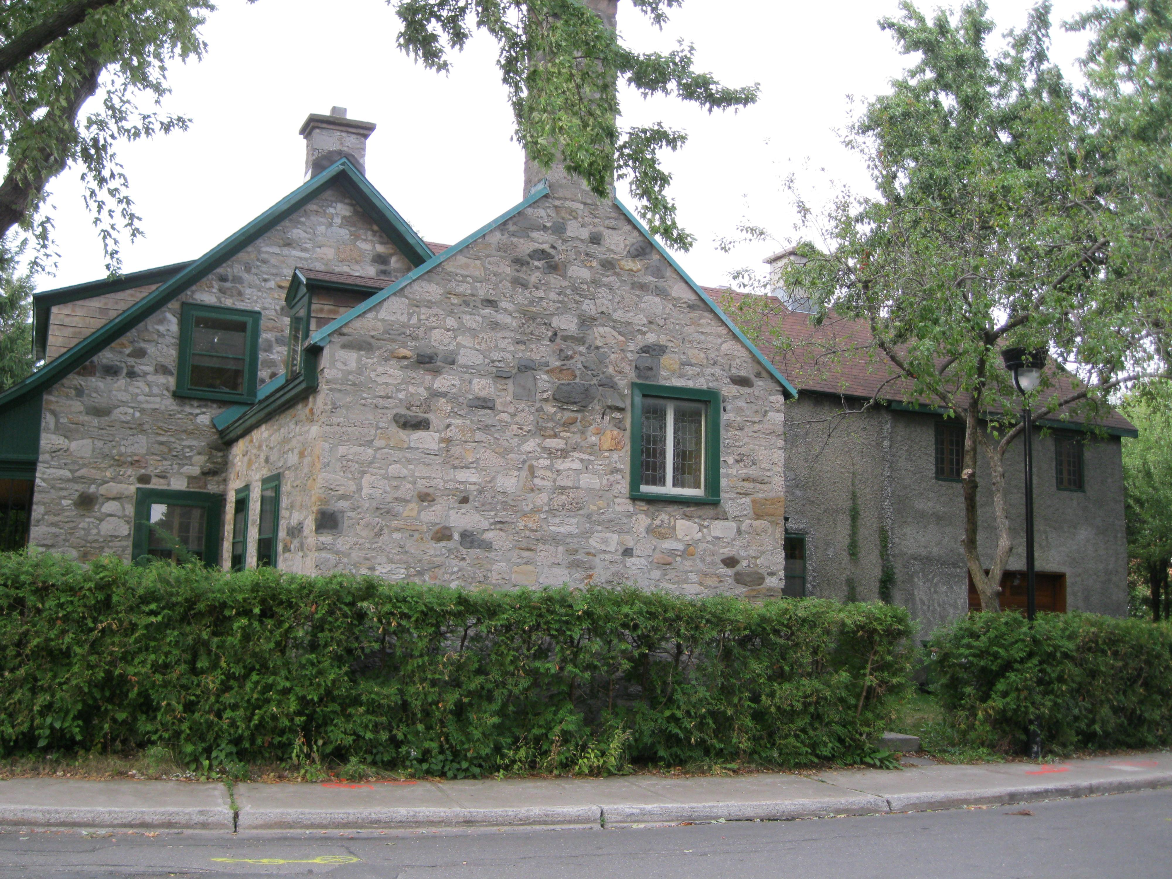 La maison Joseph-Dagenais, construite en 1825, est située au 337 Gouin est, à l'intersection de la rue Saint-Denis, dans l'arrondissement de Ahuntsic-Cartierville, à Montréal. Wikimapia